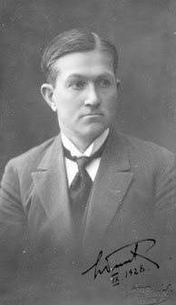 Jüri Nuut, eesti matemaatik